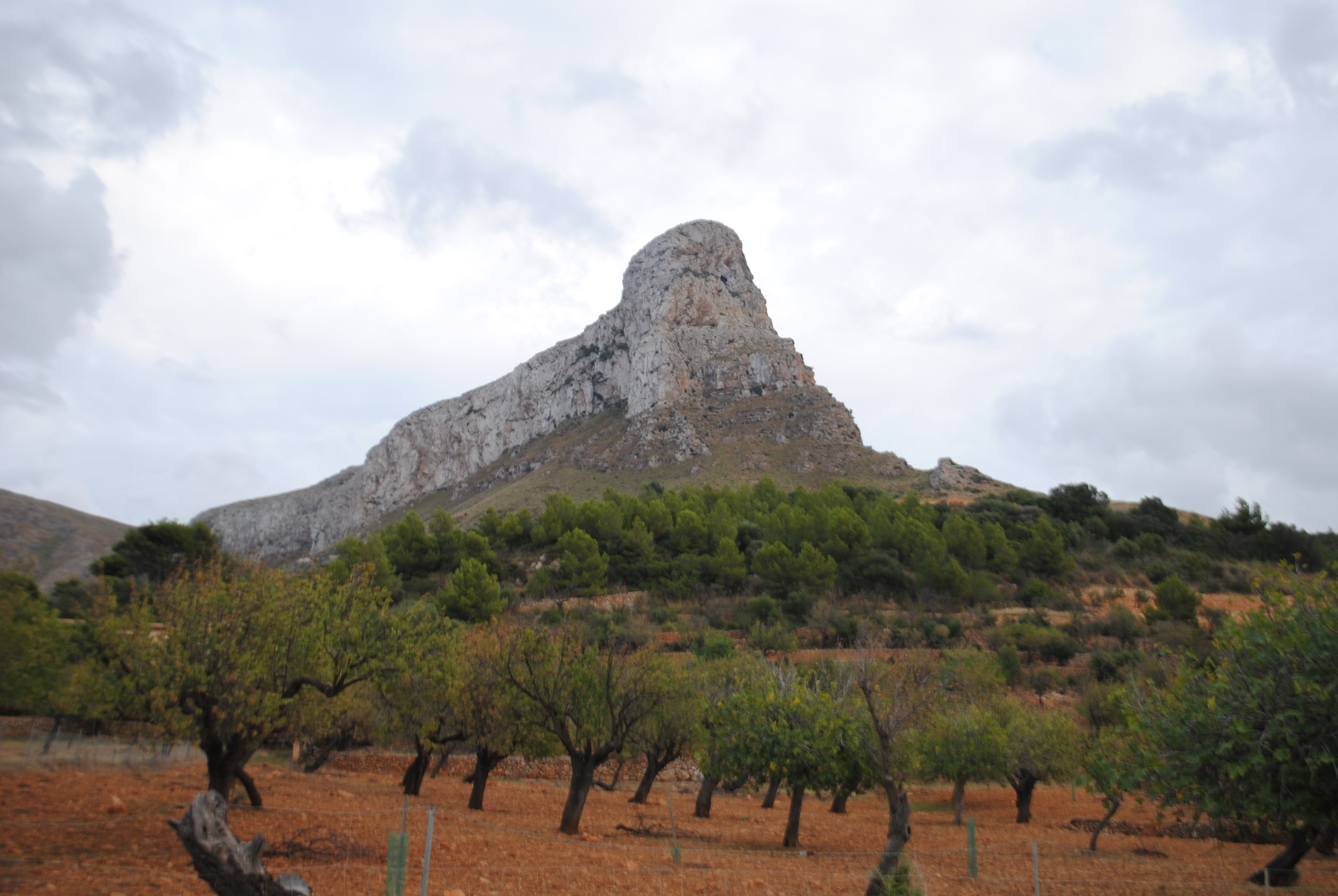 Imatge del Bec de Farrutx (Artà, Mallorca)